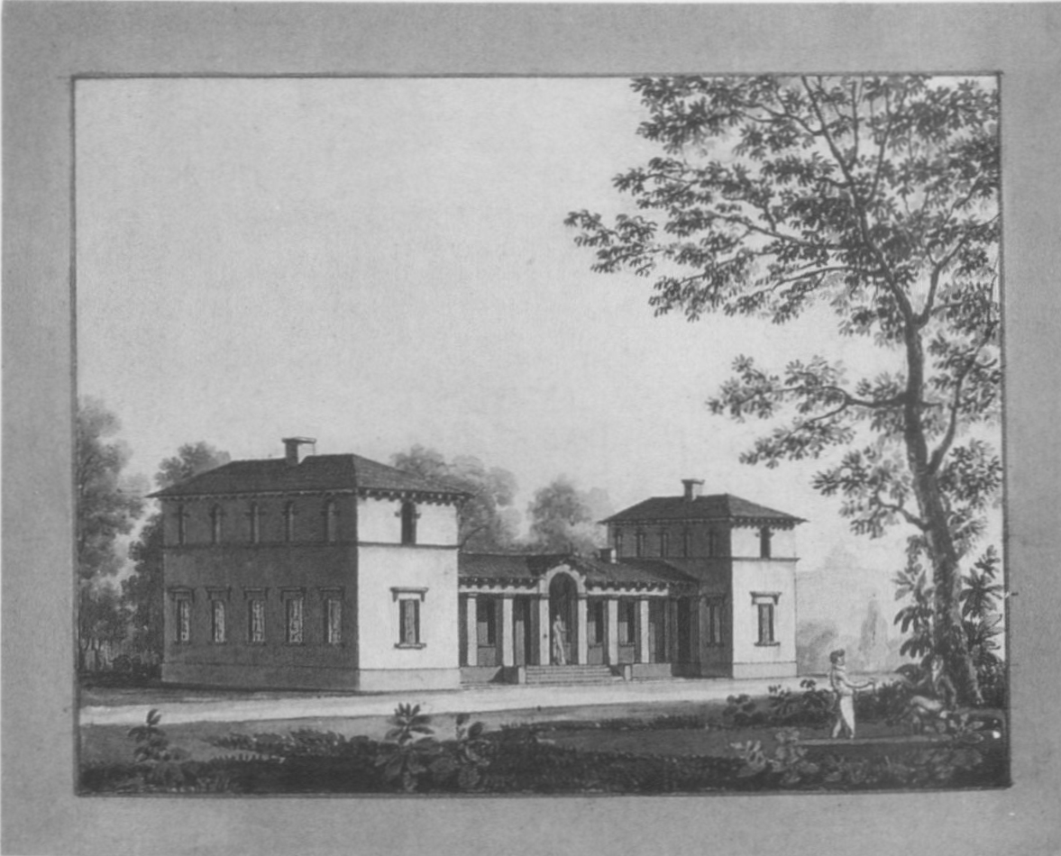 Schloss Rosenstein in Stuttgart, ehemaligen Officengebäude, um 1821. Aquarell von Giovanni Salucci, Universitätsbibliothek Stuttgart, Nachlass Salucci, Nr. 33.